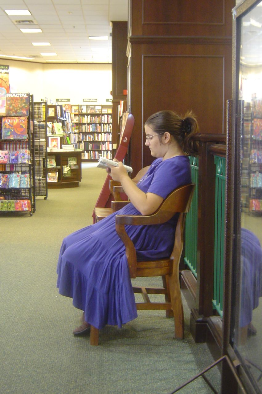 Introvert gedrag.